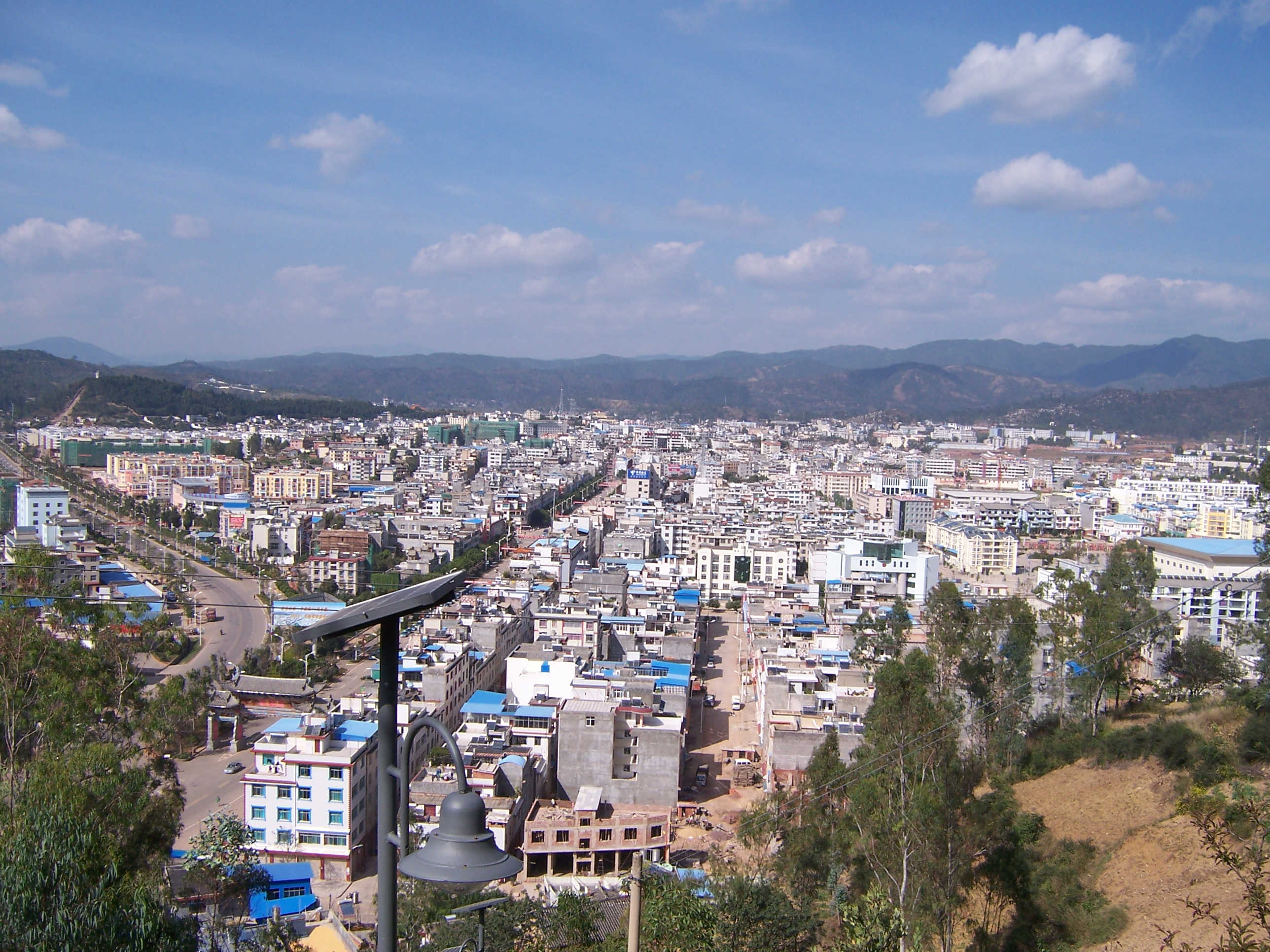 大姚县城